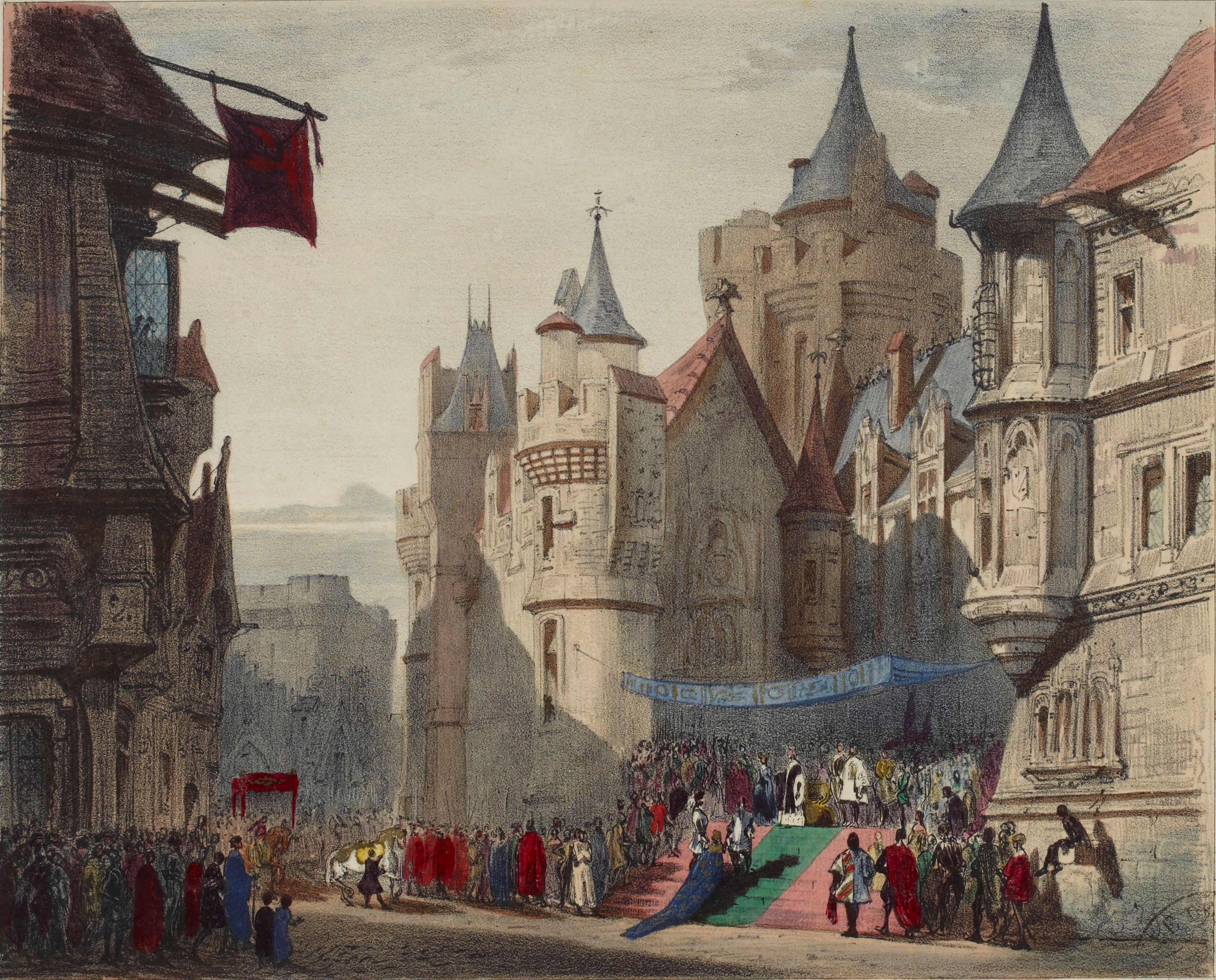 Décor du deuxième tableau de l'acte III de Charles VI, opéra de J.F. Halévy: procession des troupes anglaises devant l'hôtel Saint-Pol